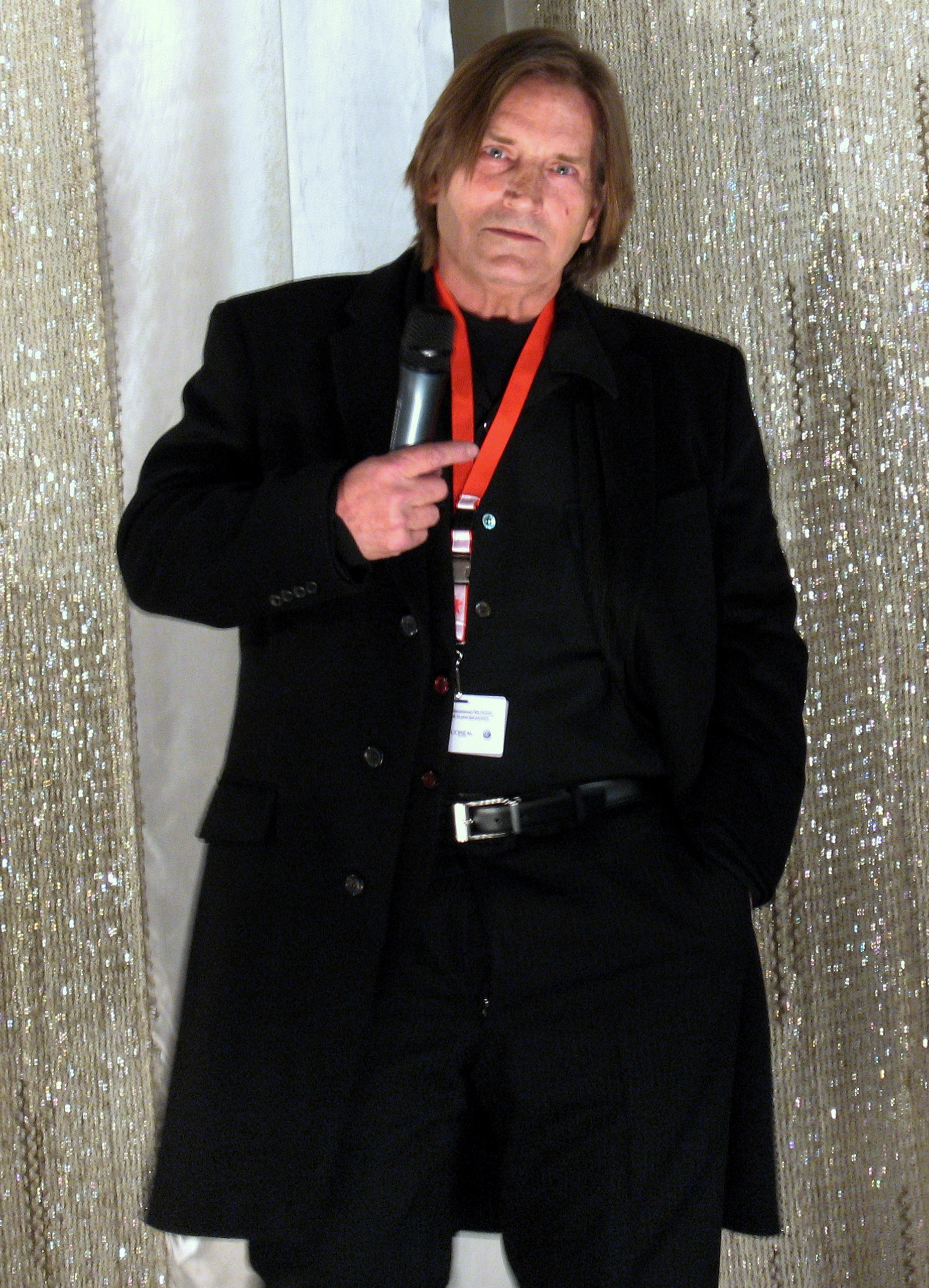 Joe Dallesandro auf der Berlinale 2009, 12.02.2009